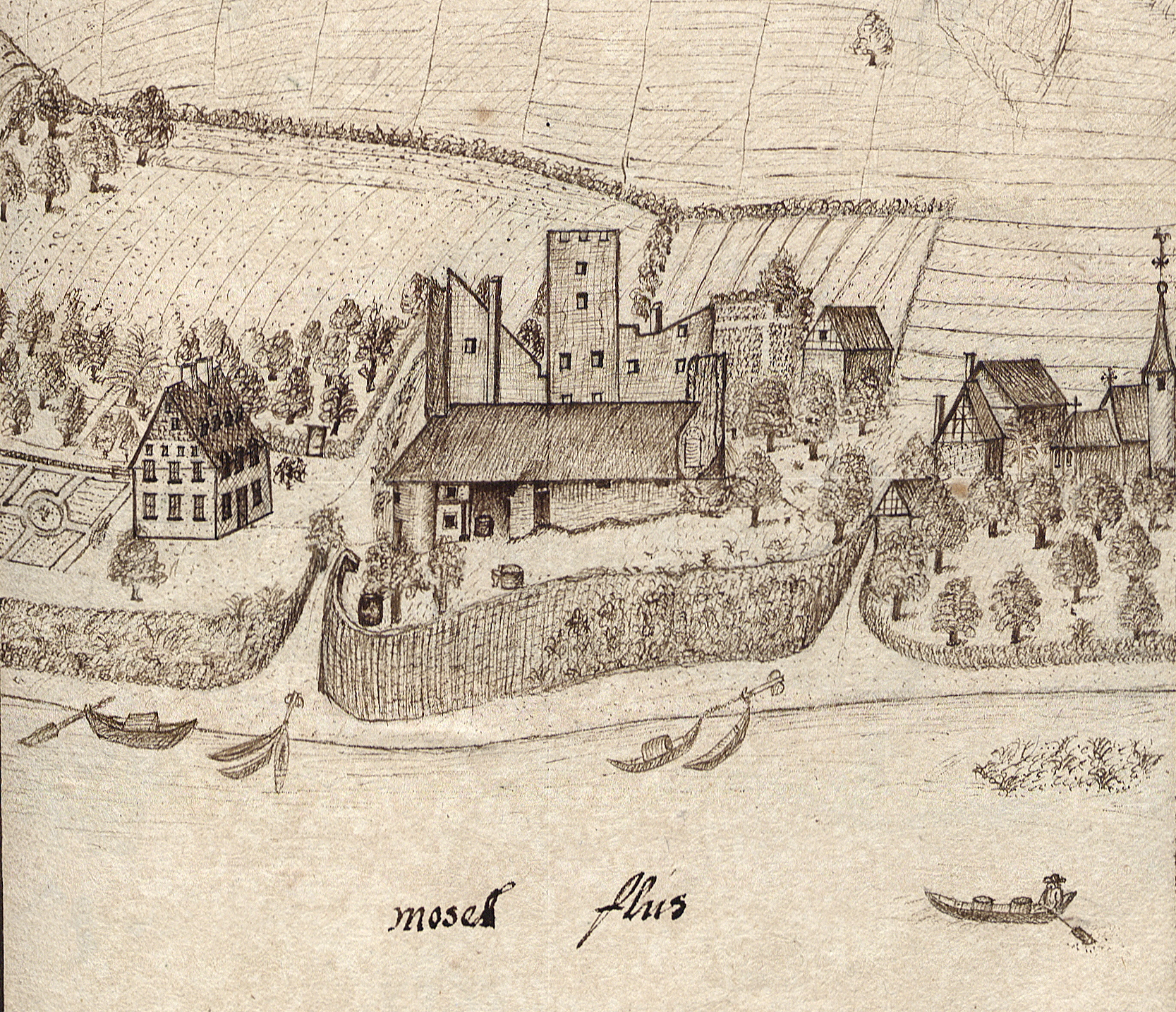 Skizze der bereits 1652 zerstörten Burg Lösnich von 1689 im Lagerbuch Band III DK 5196 der Reichgrafen von Kesselstadt